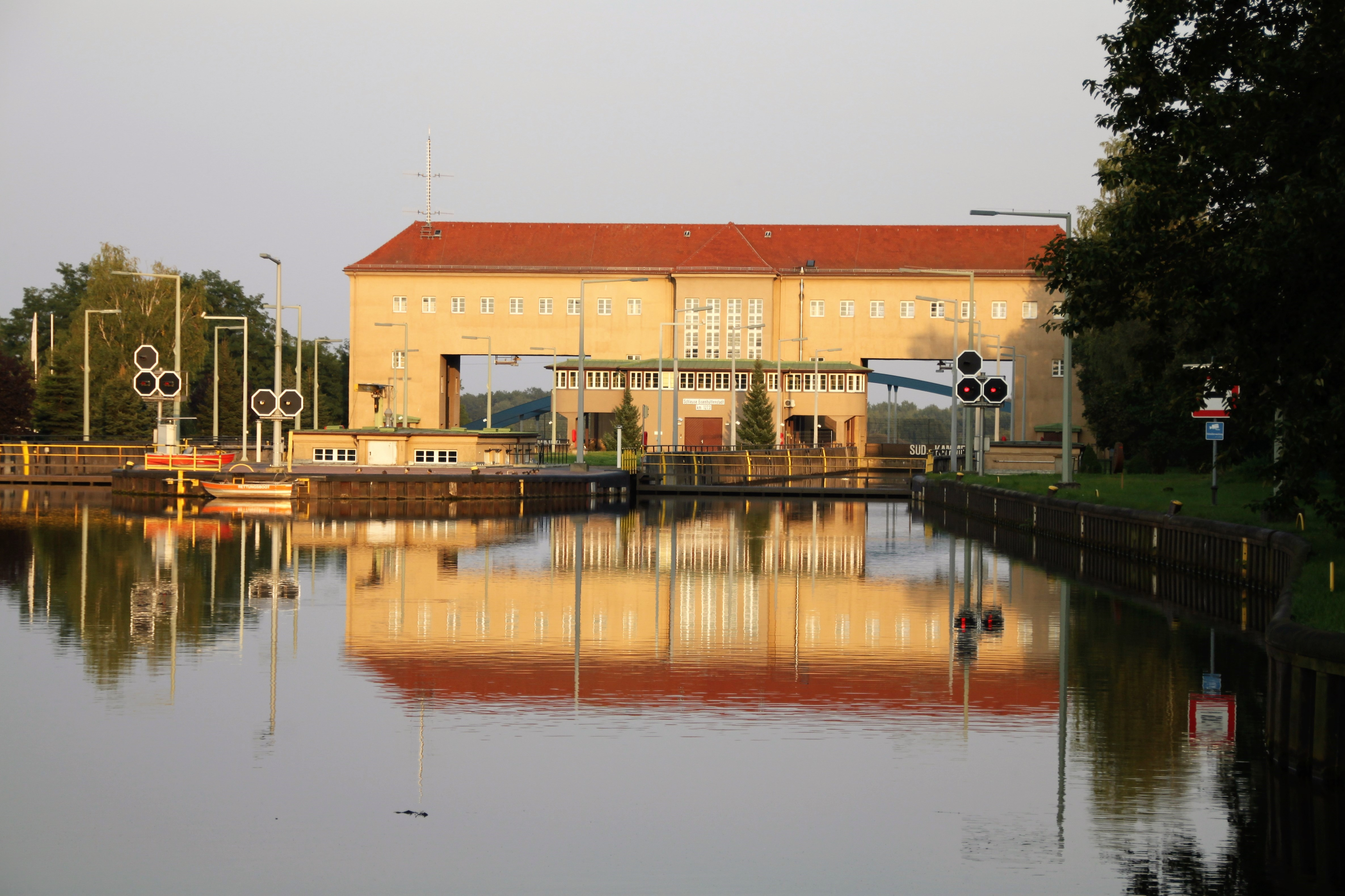 Eisenhüttenstadt - Zwillingsschachtschleuse von Westen gesehen